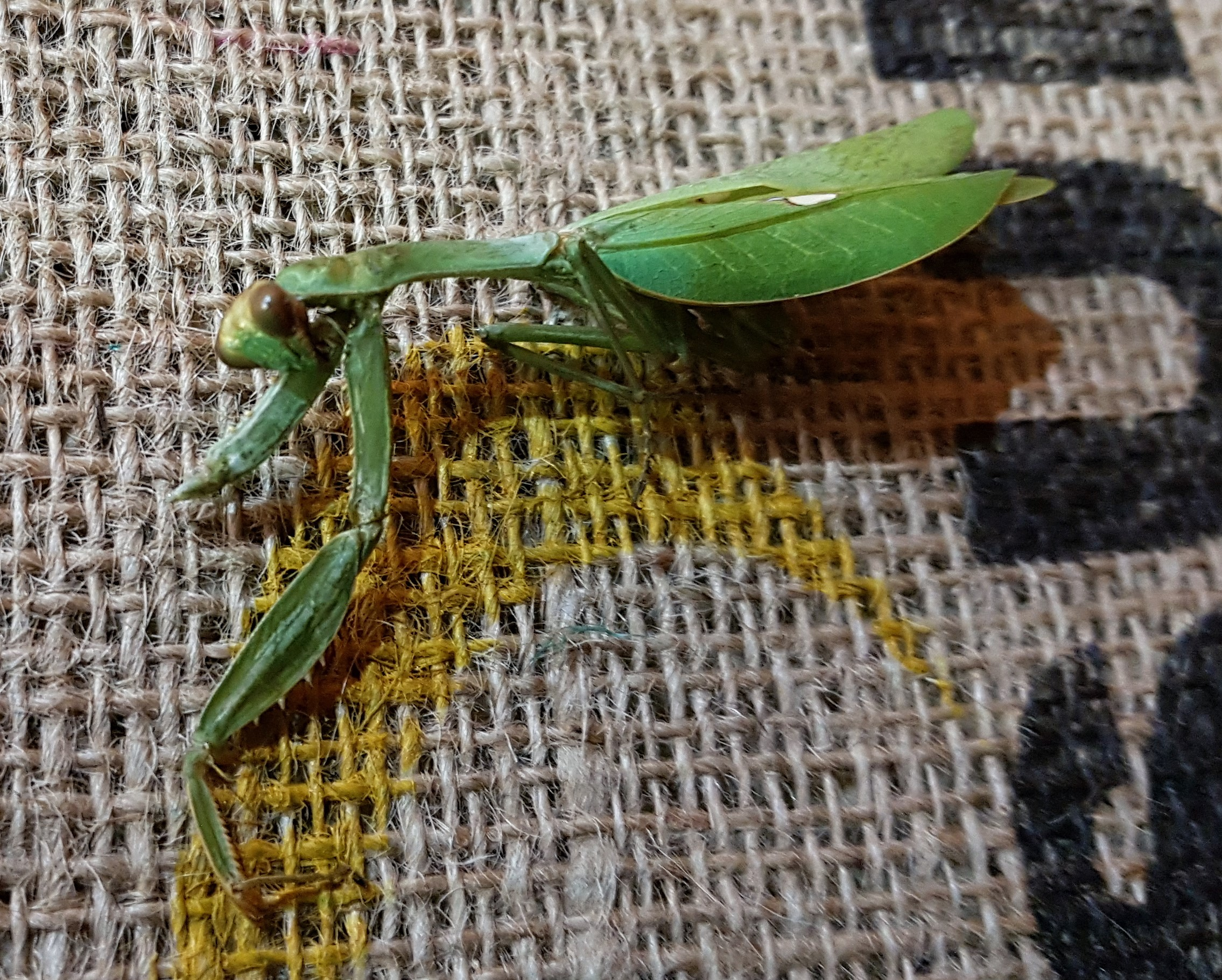 Stagmatoptera binotata Mante religieuse trouvée dans un conteneur de café brésilien